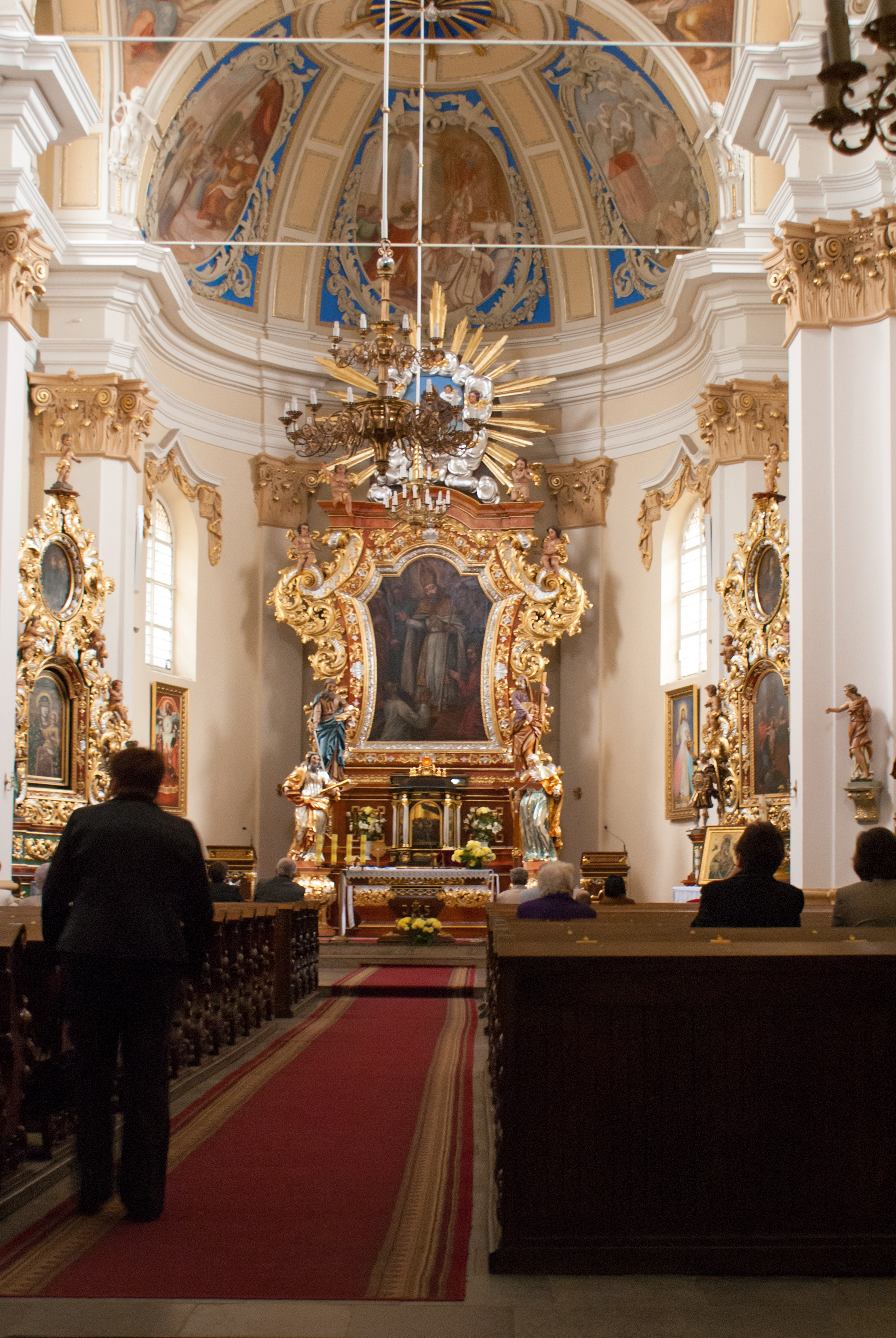 kościół parafialny pw. św. Stanisława Biskupa z lat 1717-18 Żerków, Żerków